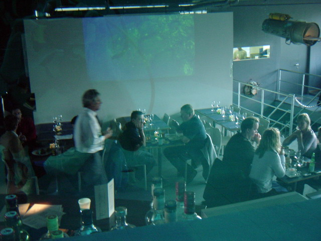 Nemo33 35m depth